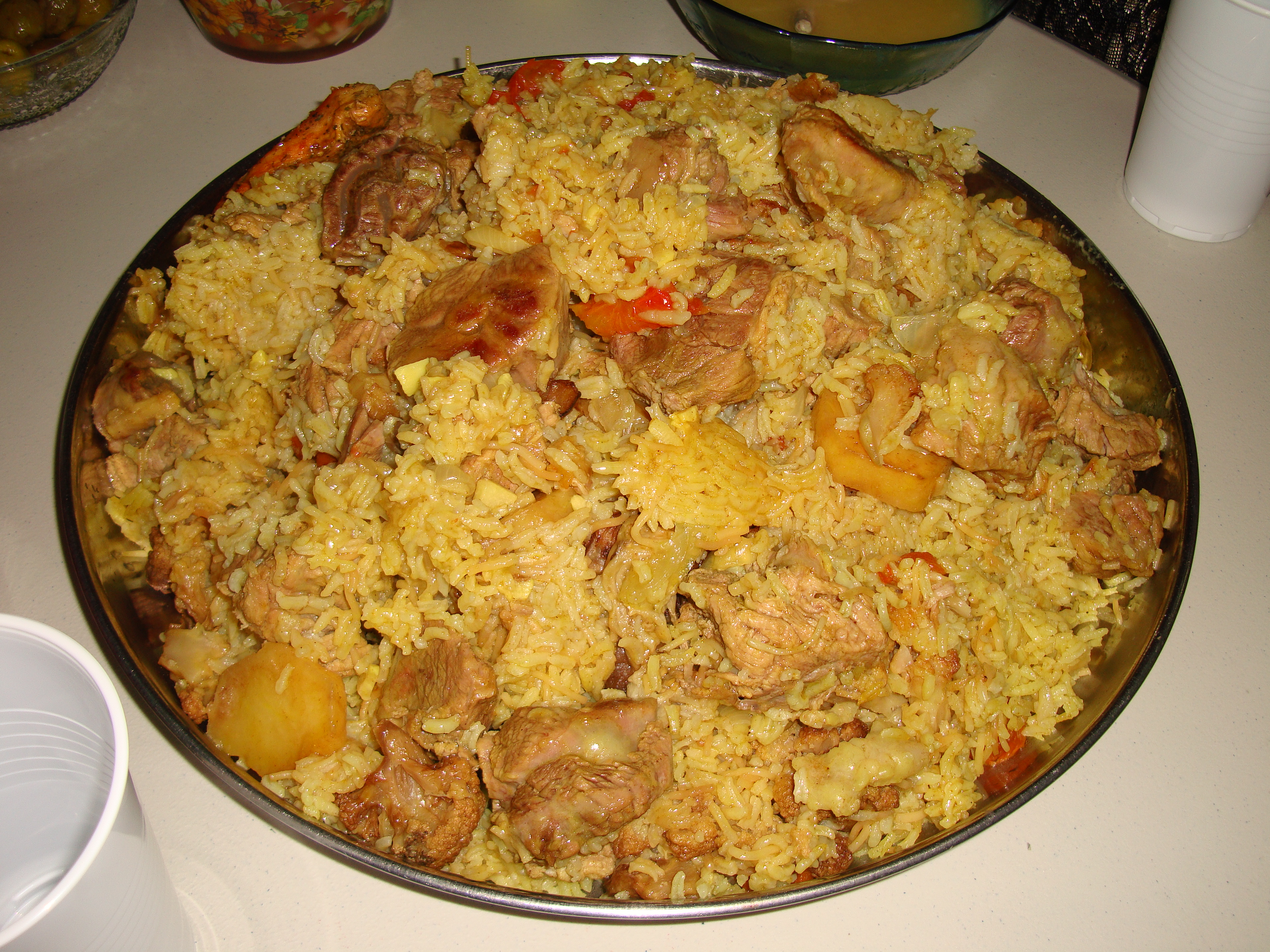 plato de makluba